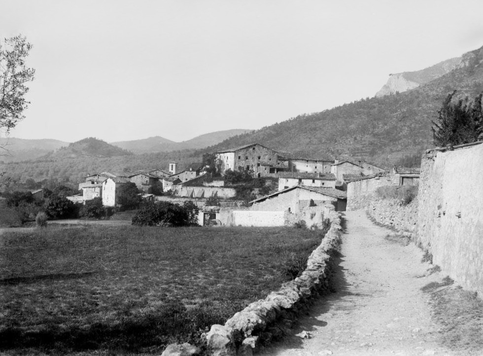 Imatge